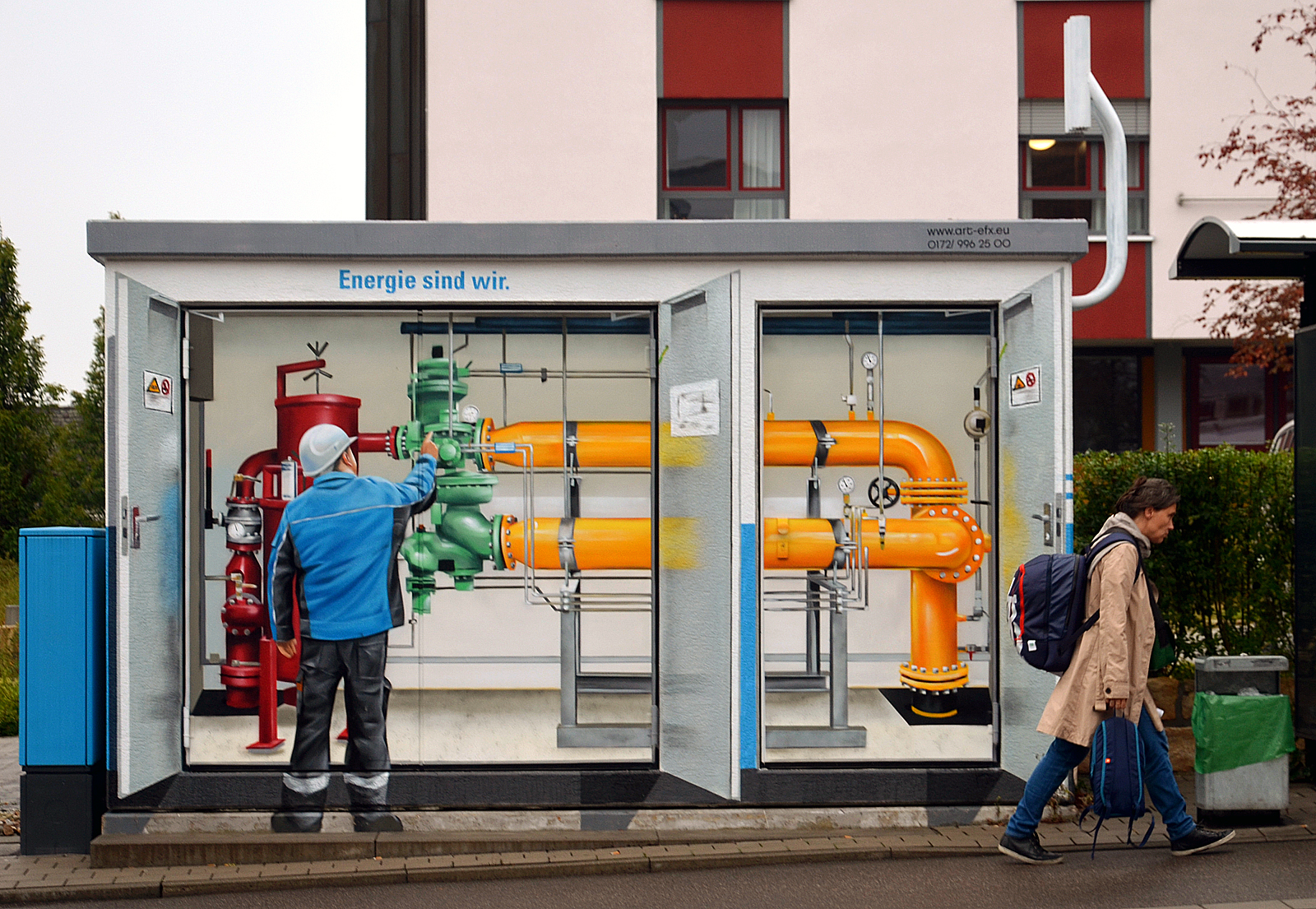 Gebäude mit der Graffiti-Kunst Stadtwerke Ludwigsburg-Kornwestheim in der Stuttgarter Straße in Kornwestheim, gesehen während der WikiCon 2016 am 18. September des Jahres ...